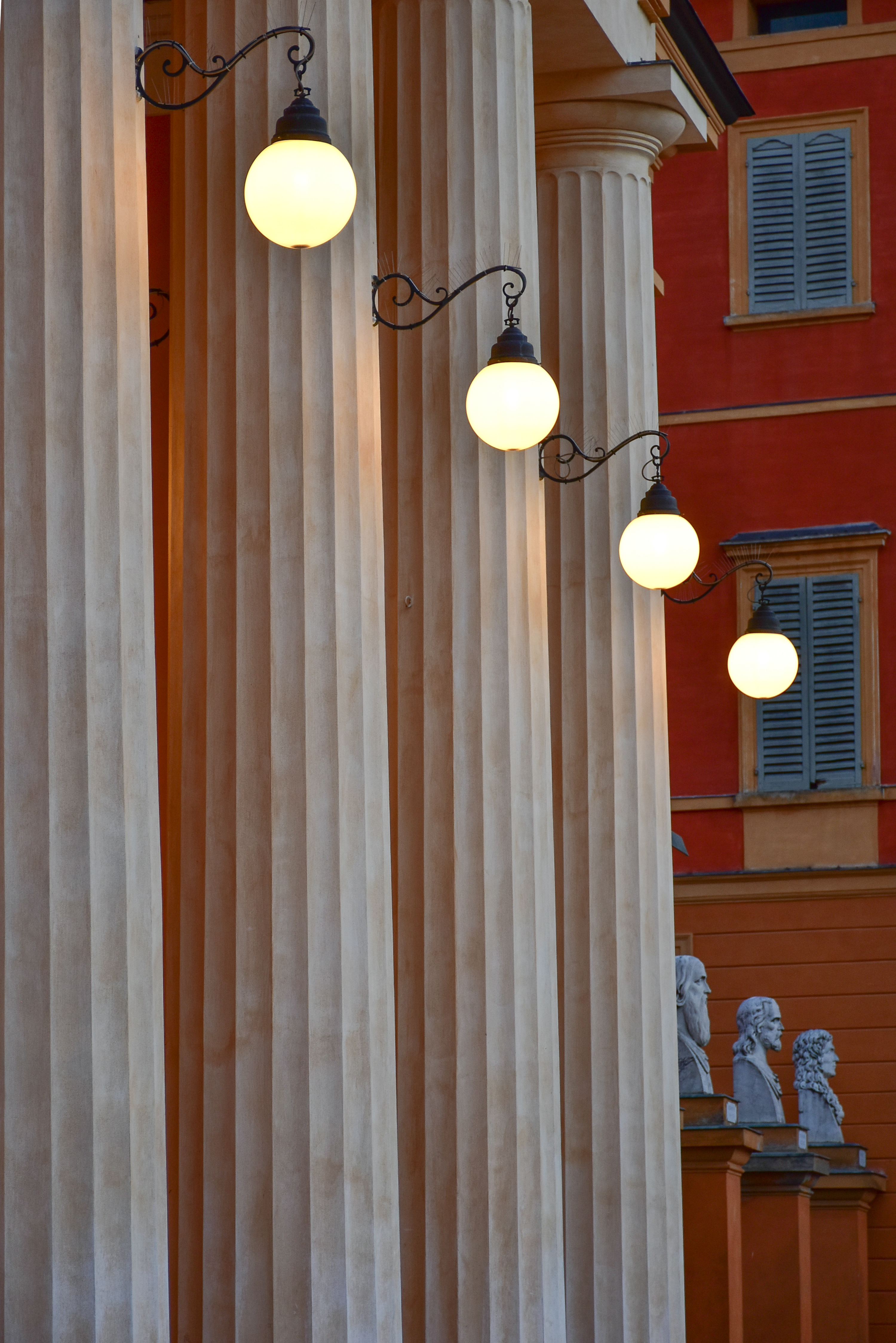 Teatro Comunale This is a photo of a monument which is part of cultural heritage of Italy.